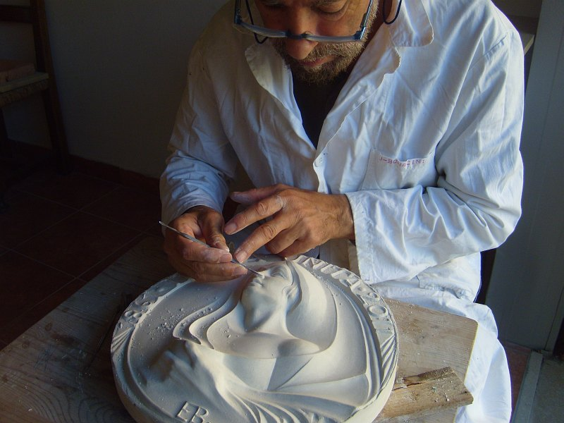 Autore Eduardo Bruno jr, opera mia, foto dello scultore Eduardo Bruno, opera personale